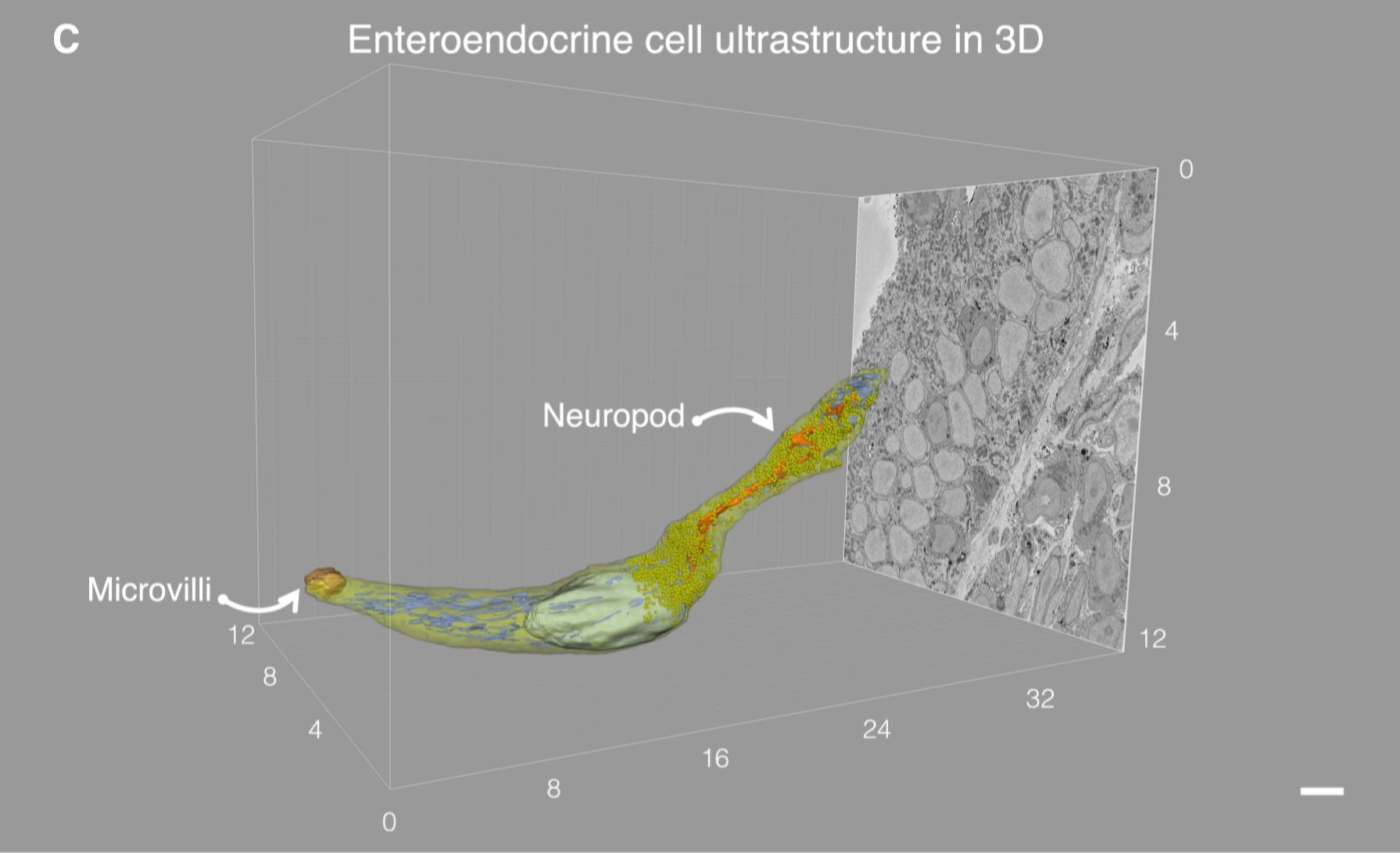 Figura 2. Reconstrucción de la ultraestructura celular enteroendocrina en 3D. C. La célula enteroendocrina se trazó en cada corte para revelar toda su ultraestructura. A la izquierda, la célula tiene un mechón de microvellosidades expuestas a la luz intestinal. A la derecha hay un neurópodo prominente que se extiende hacia la lámina propia basal. Barra= 1 µm.